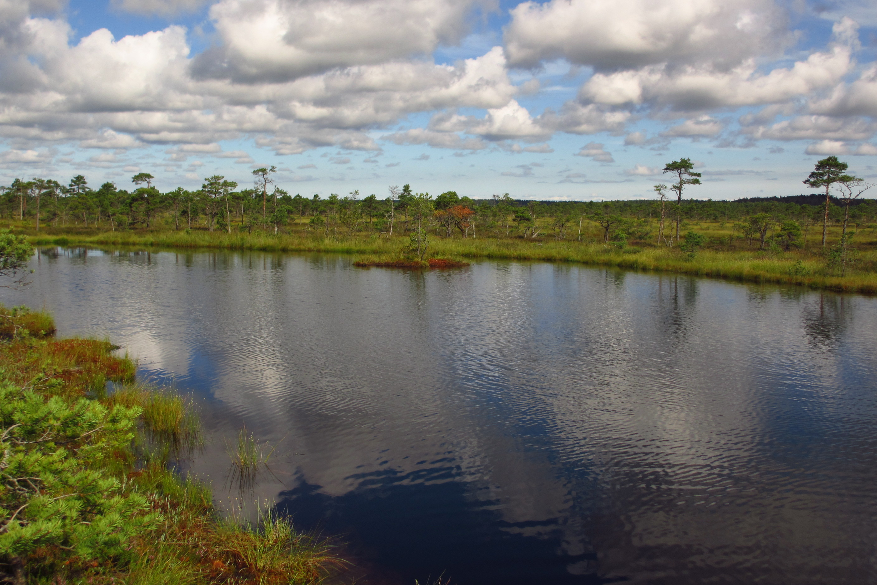 Laugas Kuresoos Soomaa rahvuspargis Hüpassaare kohal